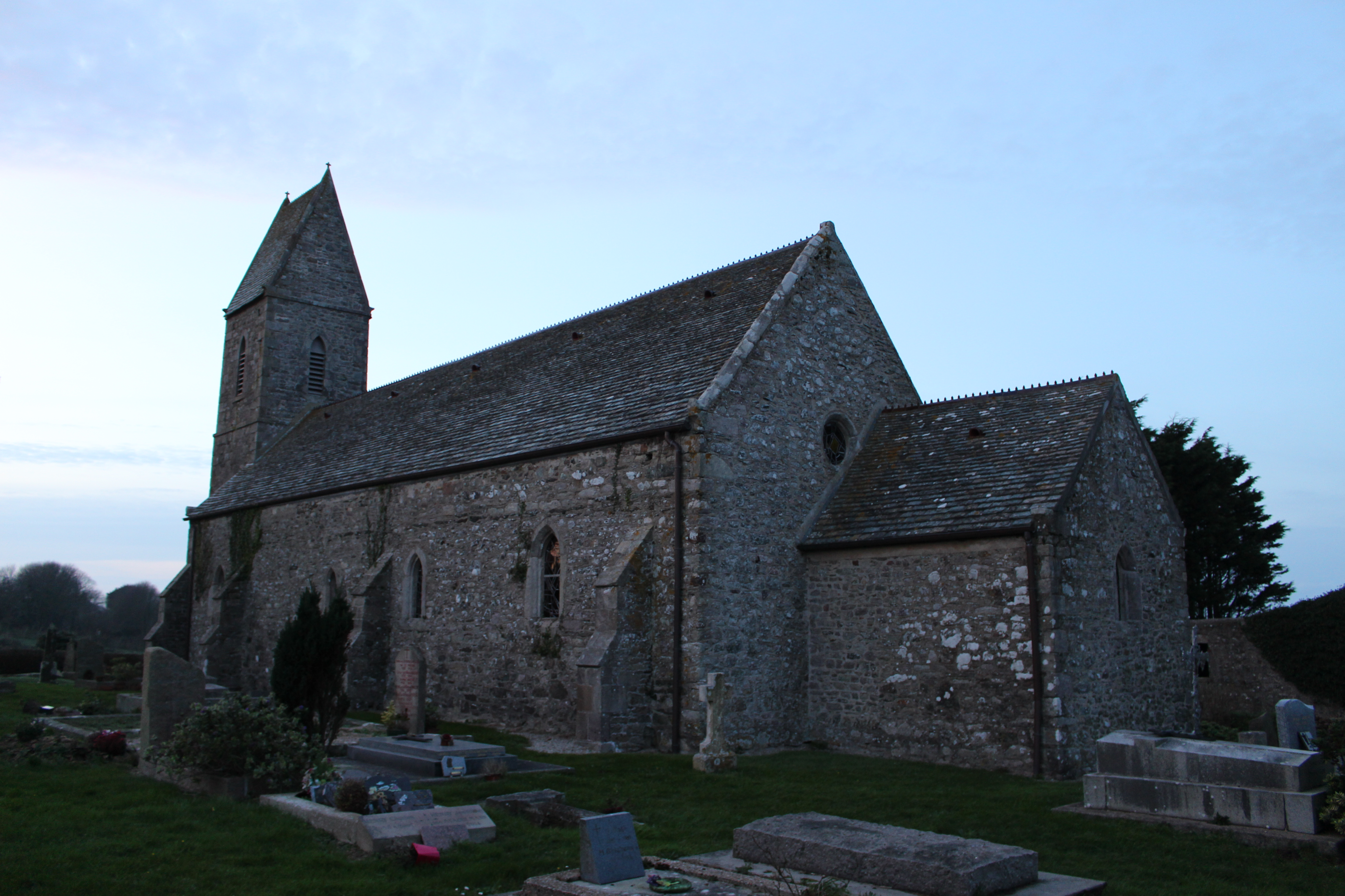 Éculleville, Manche